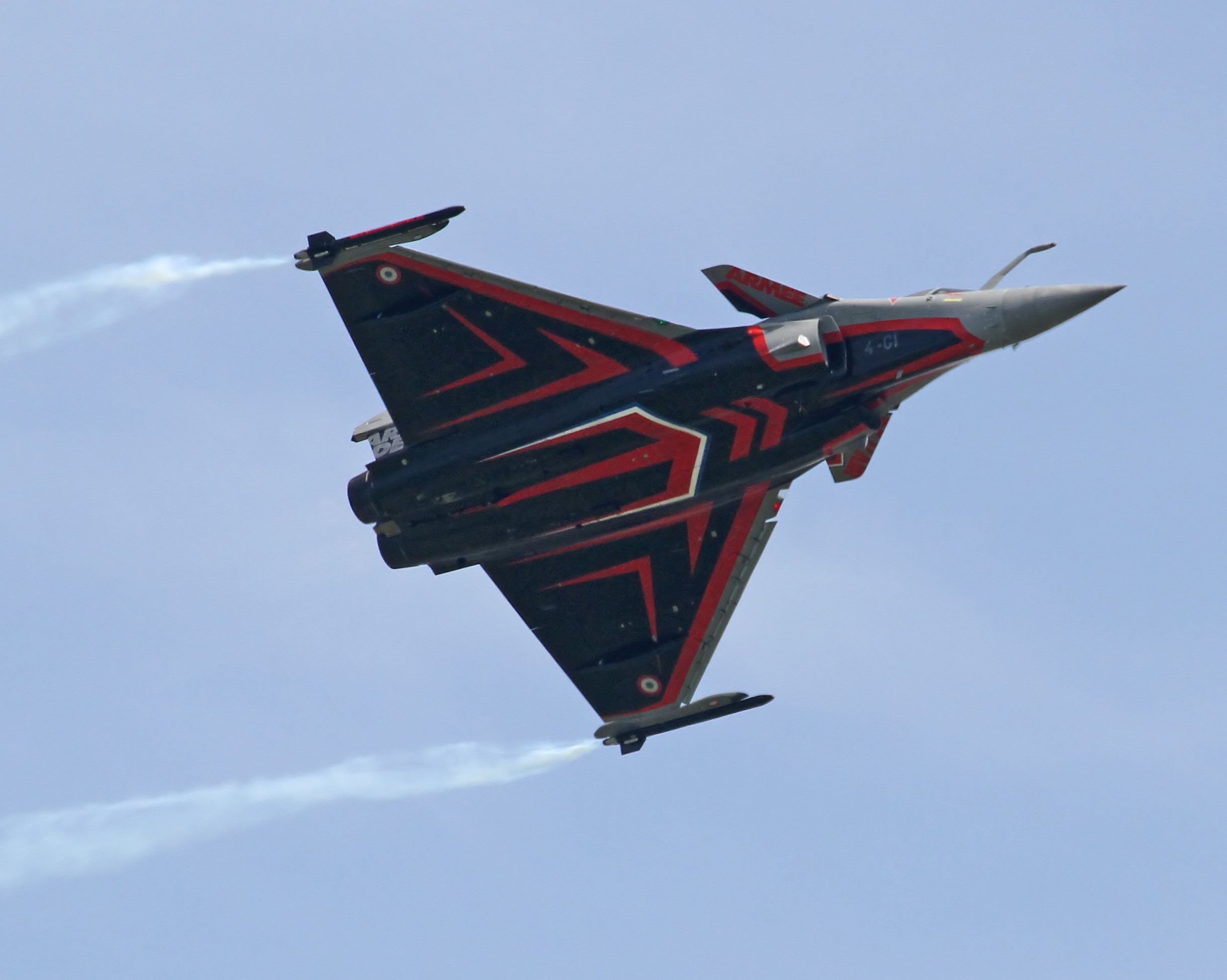 Dassault Rafale 10